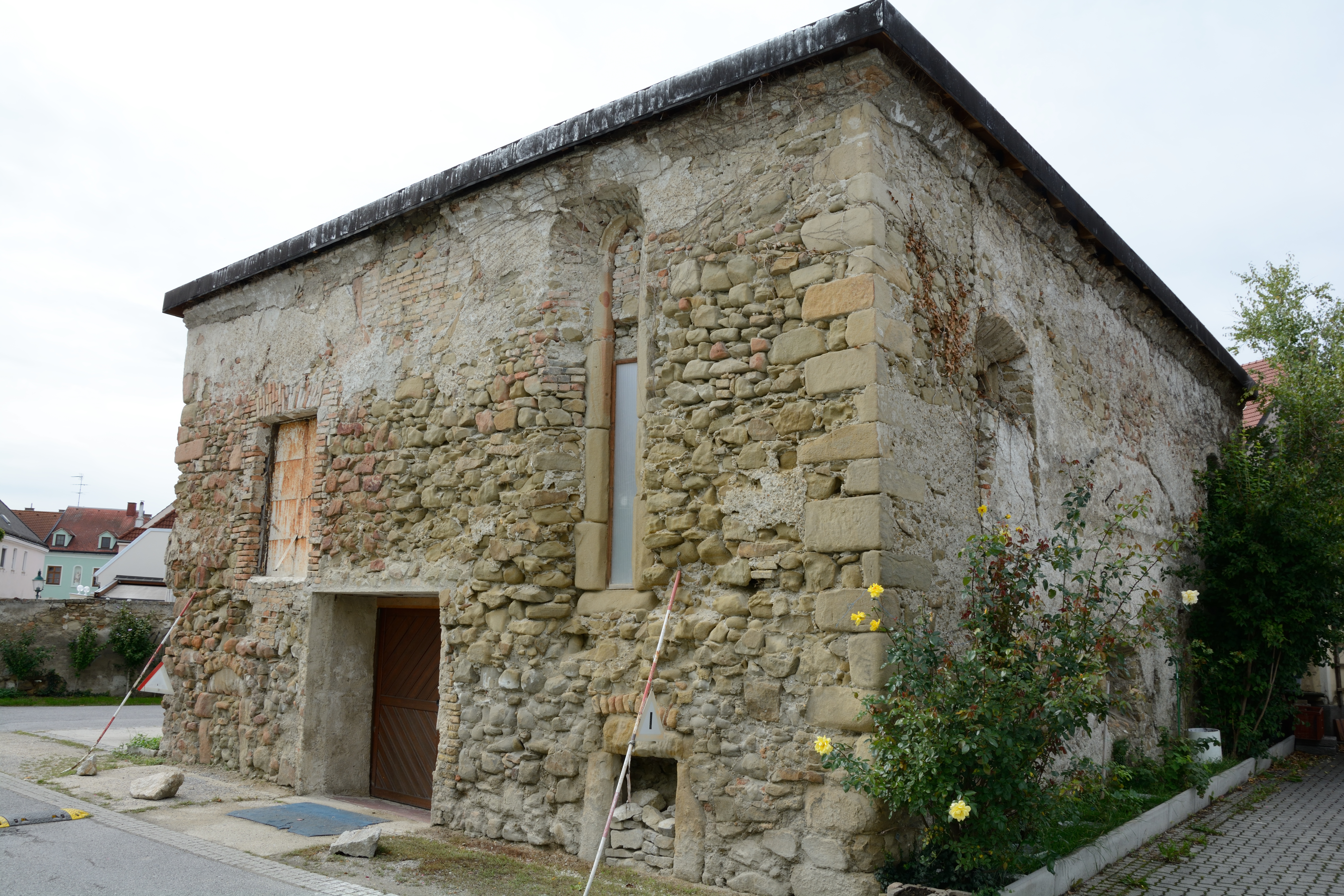 Mauerzüge d. ehem. Synagoge Roßmühle